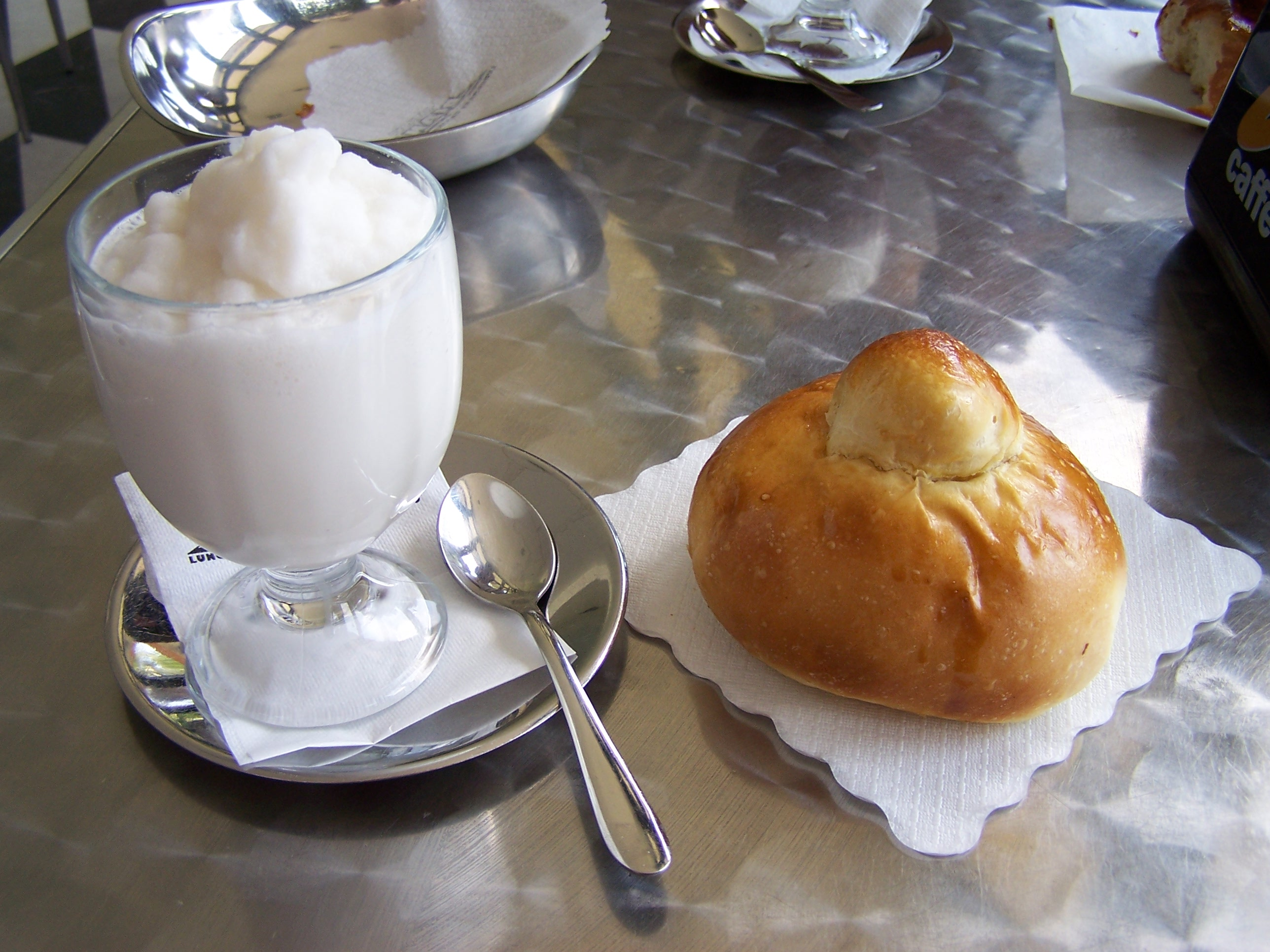 Granita al limone e brioche; breakfast in Sicilia